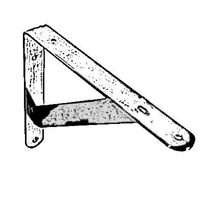 Kaasaegne konsool